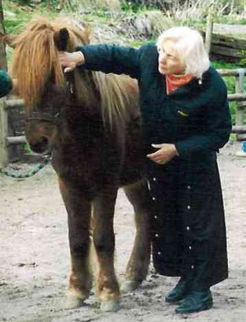 Linda Tellington Jones, Jugendfarm Stuttgart